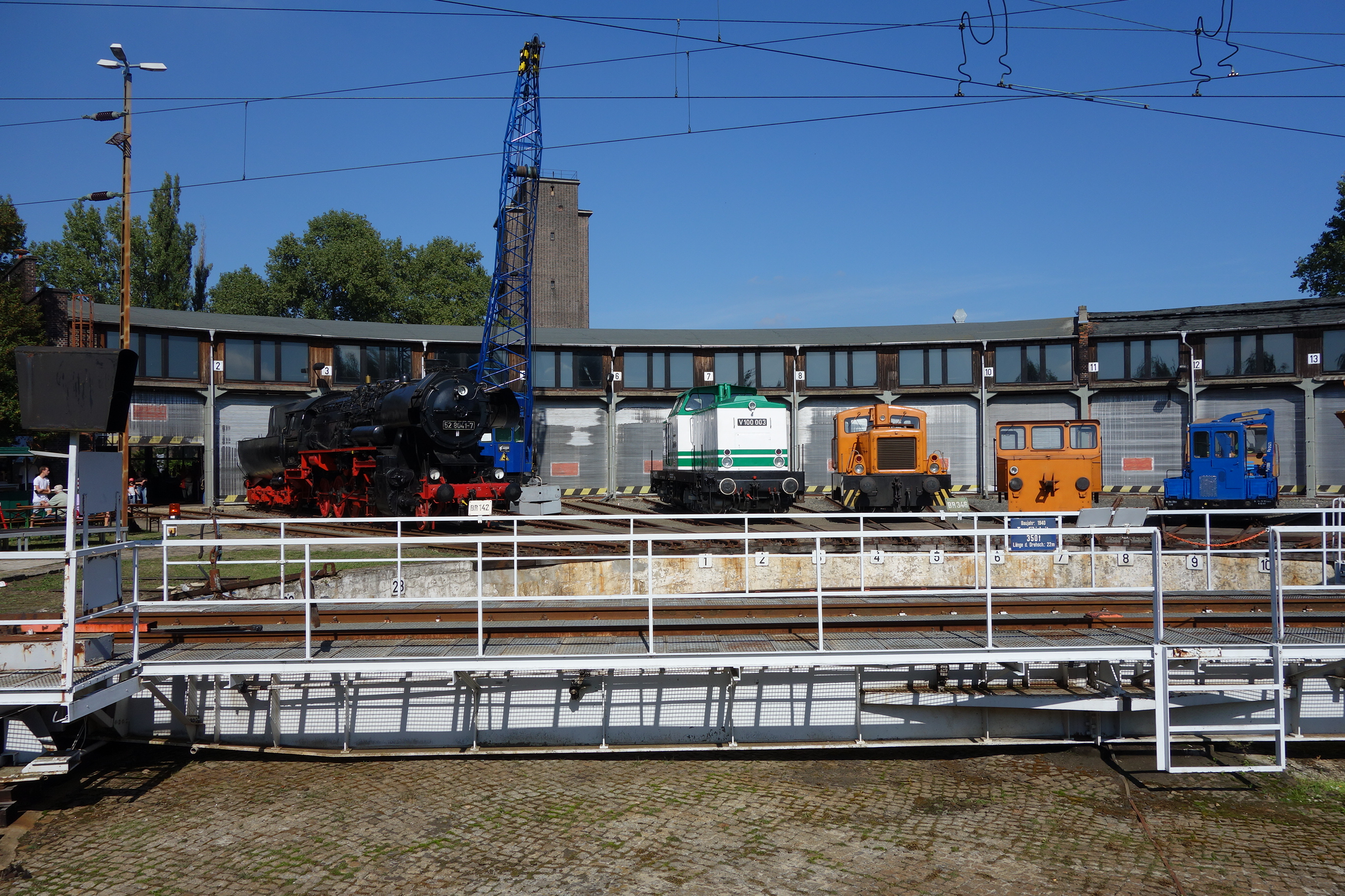 Bahnbetriebswerk Lutherstadt Wittenberg, Ringlokschuppen, Drehscheibe, Fahrzeugparade.